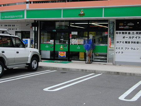 シーガルひだ古川バイパス店です。現在は閉店しています。